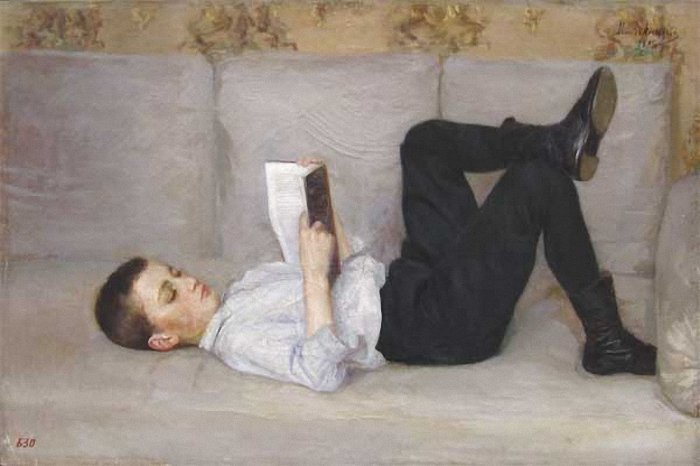 Исаак Аскназий С книгой. 1898 г. Курская государственная картинная галерея имени А.А.Дейнеки